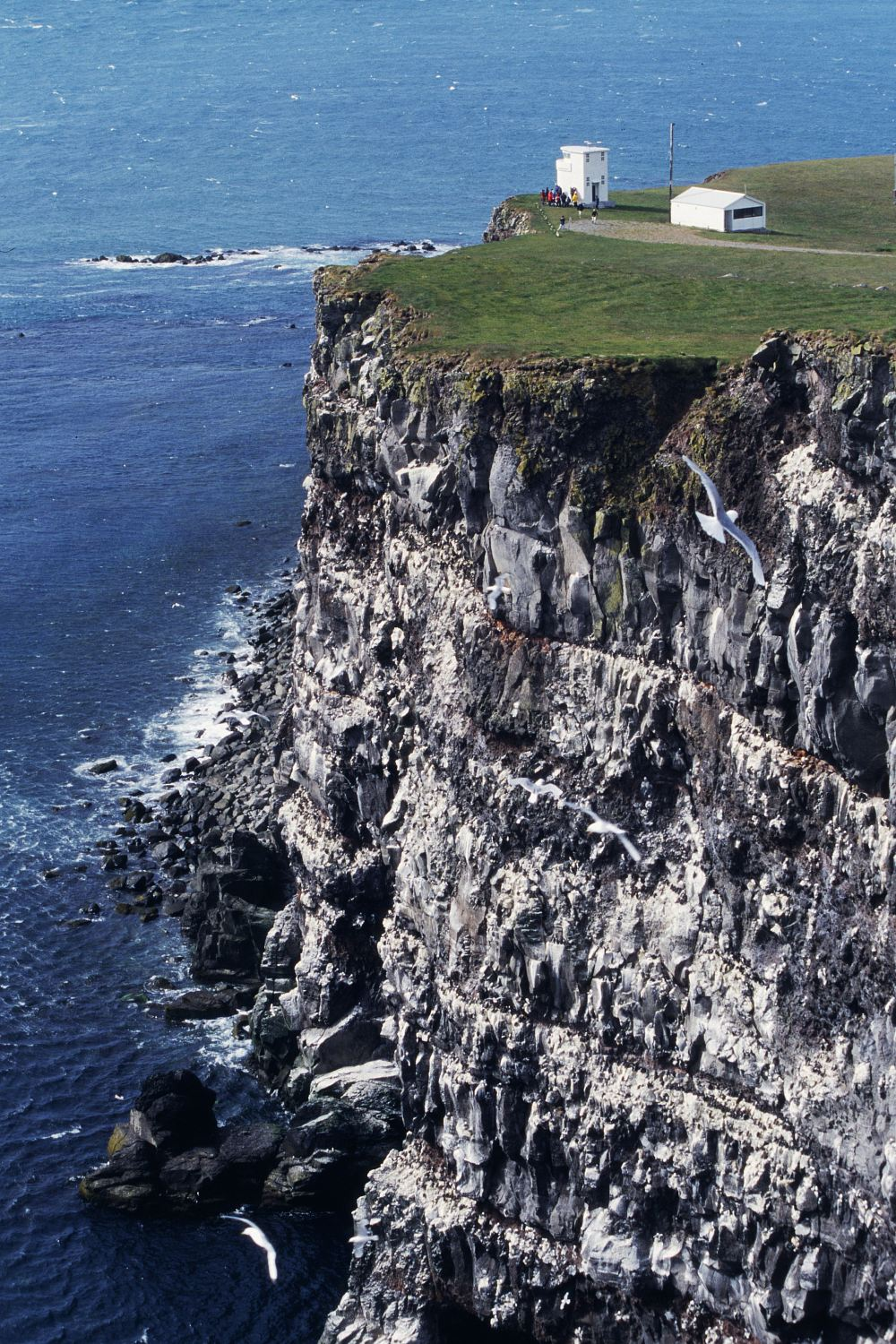 Description: The Látrabjarg cliffs on the Vestfirðir coast in Iceland Die Steilküste am Látrabjarg in den isländischen Westfjorden own image, taken July 12, 2003 Photographer: Herbert Ortner, Vienna, Austria